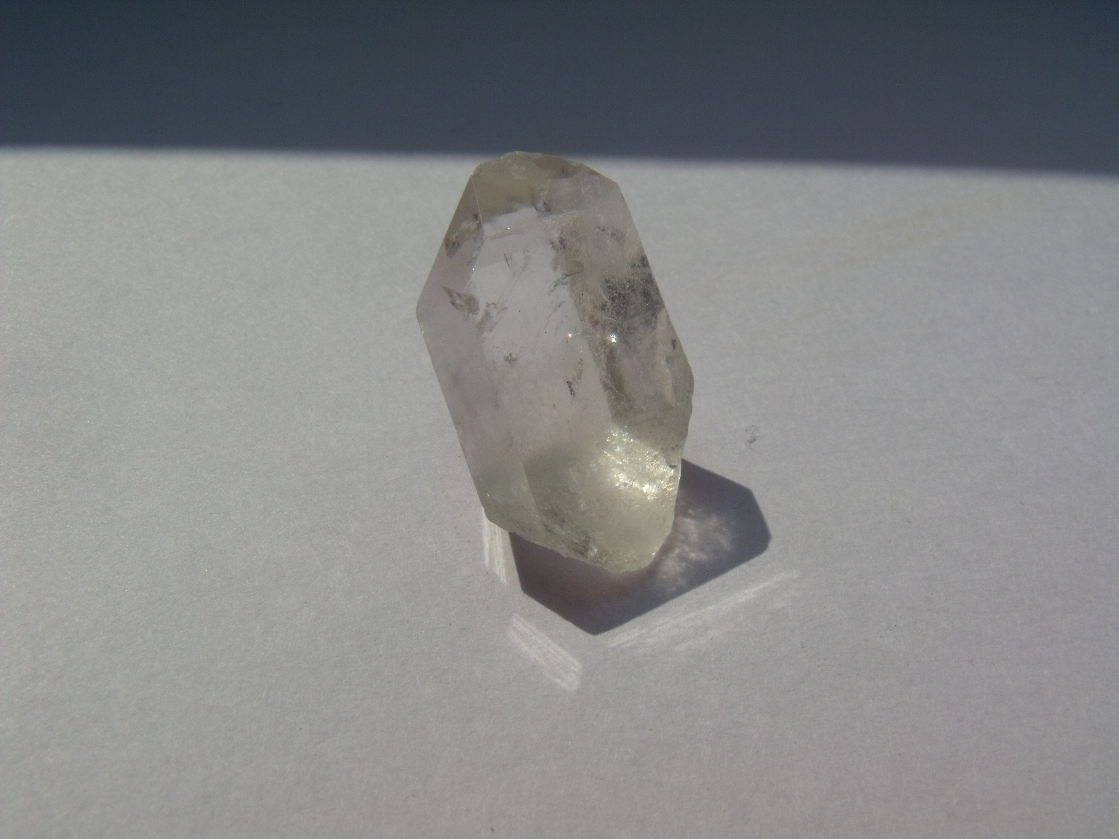 Bergkristall von 4cm Länge